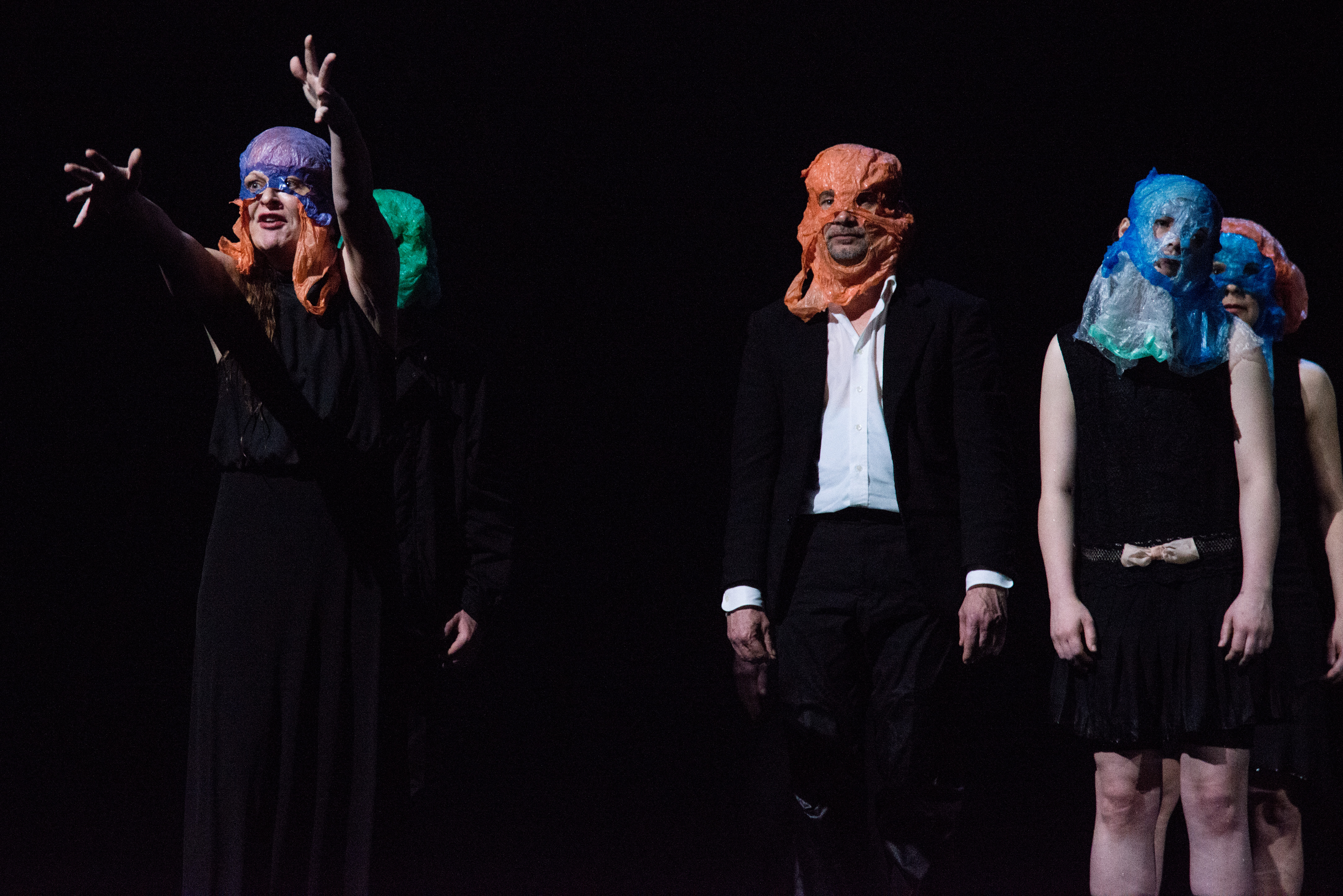 Die Schutzbefohlenen von Elfriede Jelinek, Burgtheater Wien 2015